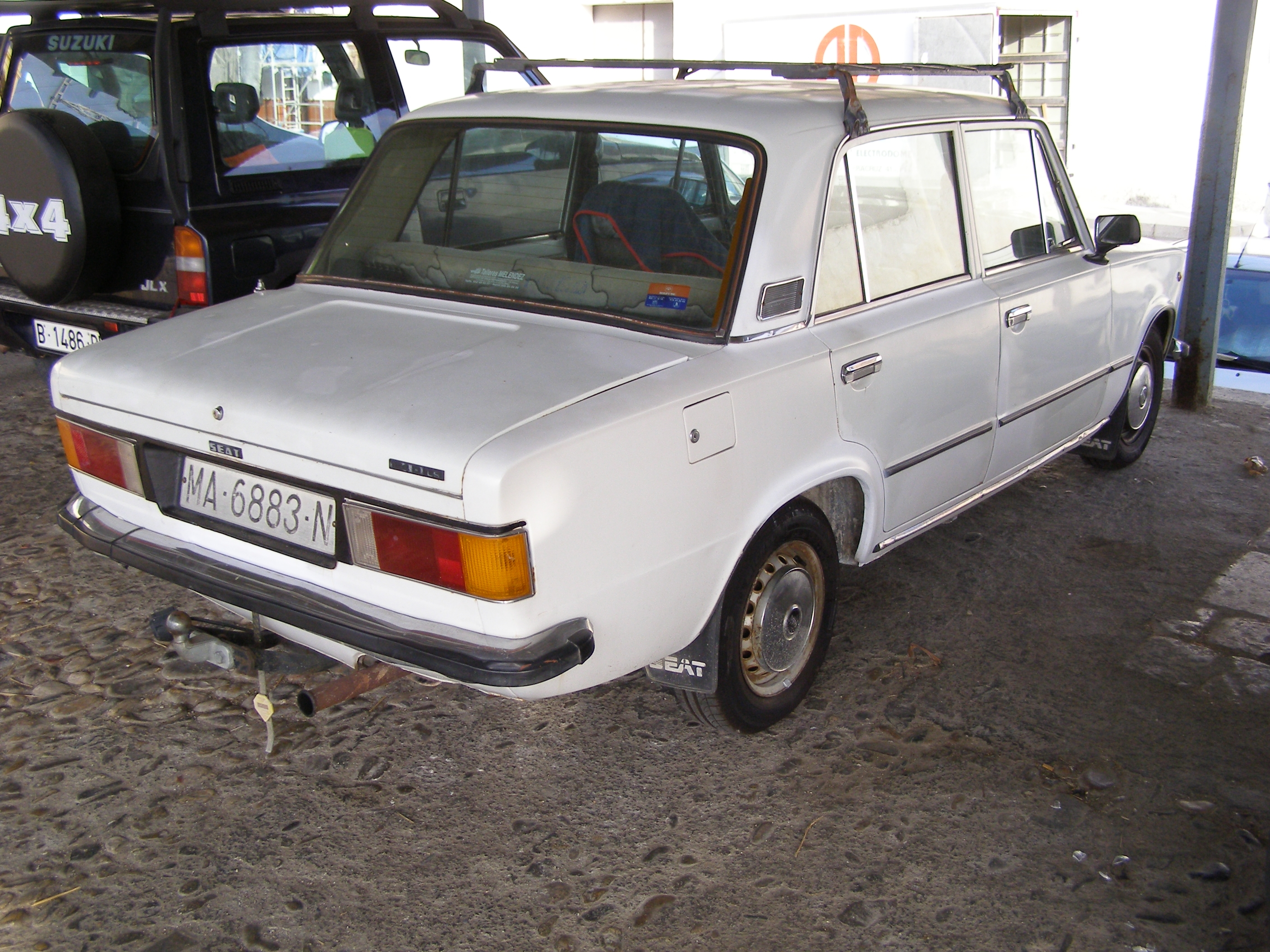 Álora - Seat 124